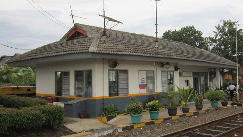 La gare de Gedebage à l'est de Bandung